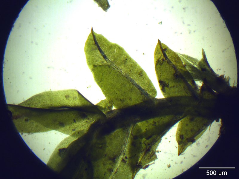 Eibenblättriges Spaltzahnmoos (Fissidens taxifolius), Blattscheiden und Blätter, Vergrößerung: 40x